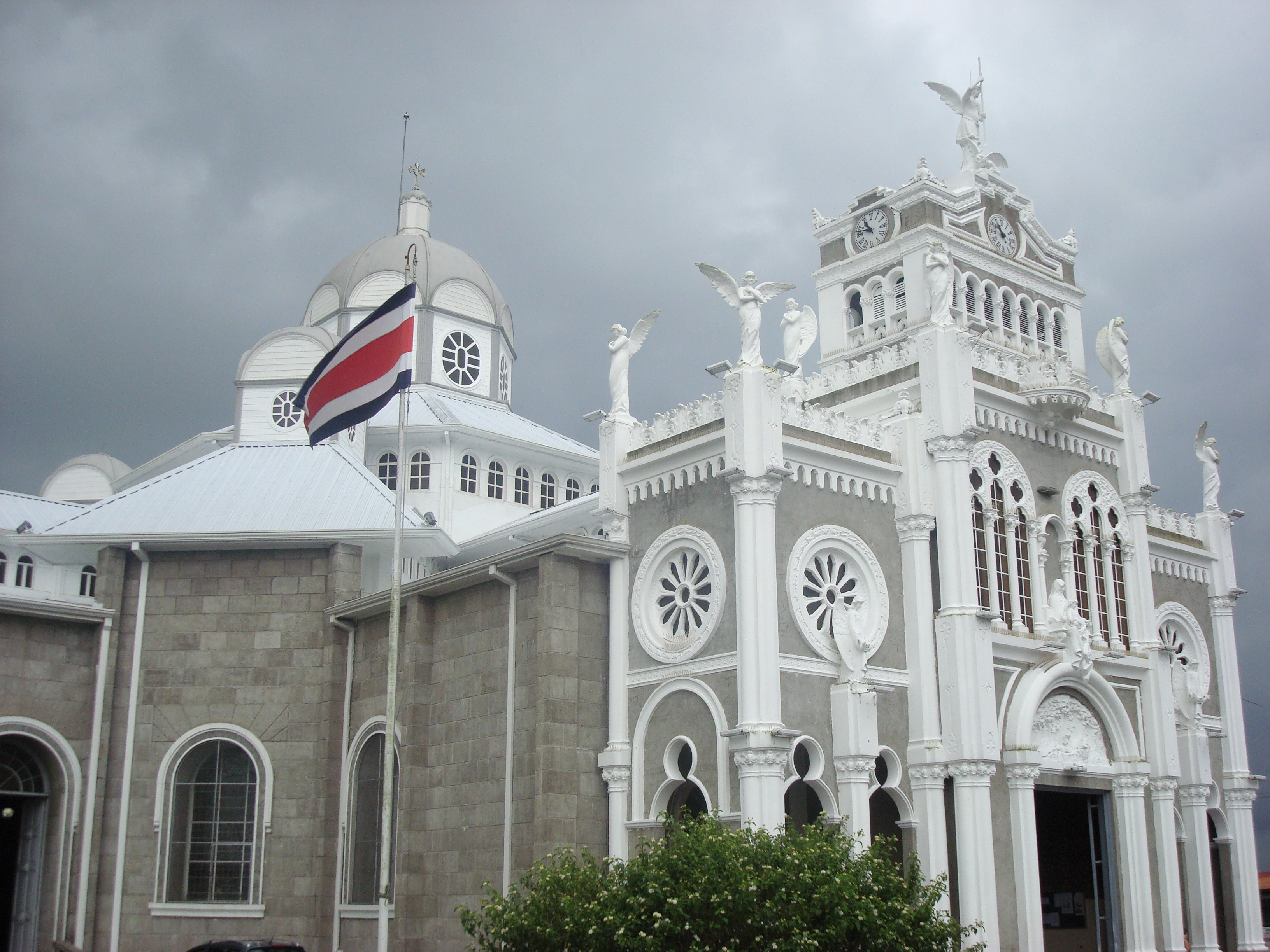 Basílica Nuestra Señora de los Ángeles